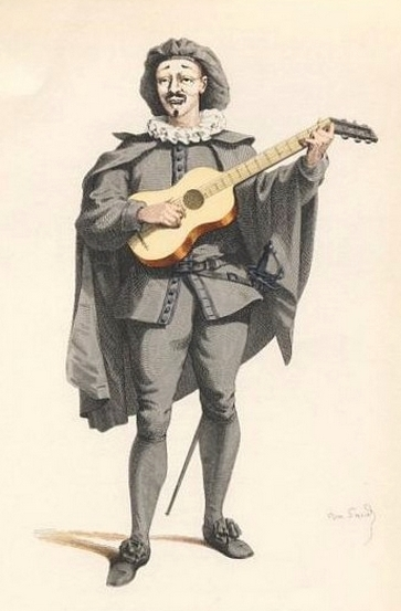 Scaramuccia